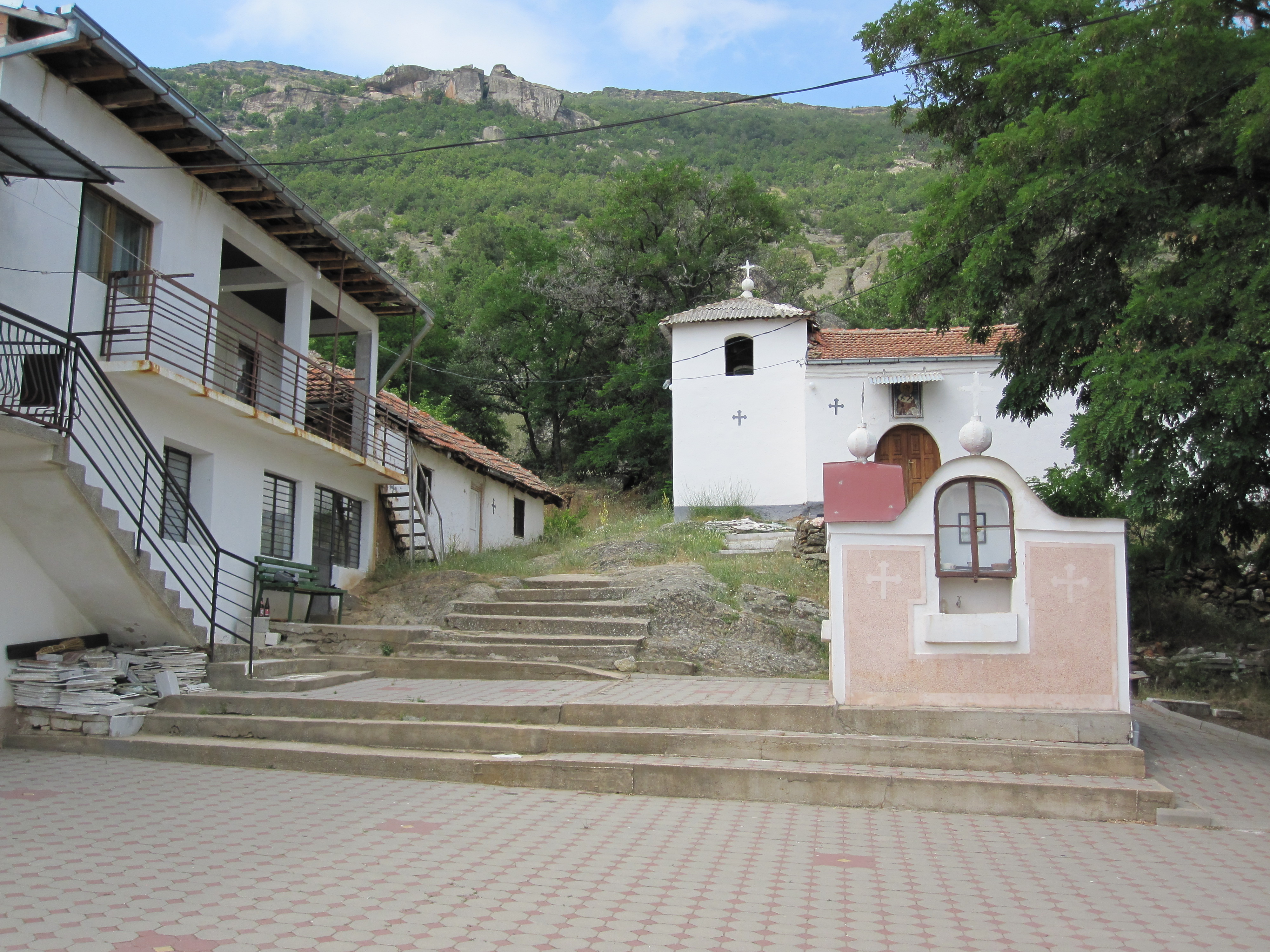 Манастирот „Свети Атанасиј“ - с. Дреновци - Прилеп